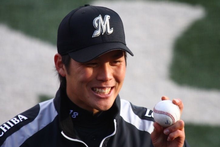 日本プロ野球 千葉ロッテマリーンズ 藤岡貴裕 投手 4/1ヒーローインタビュー